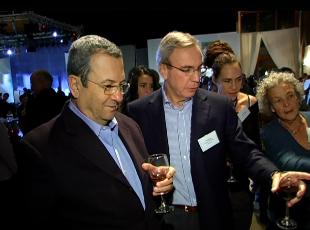 אהוד ברק ונתן חברוני באירוע מורשת שכונת שלושת הבתים בטבריה 2010